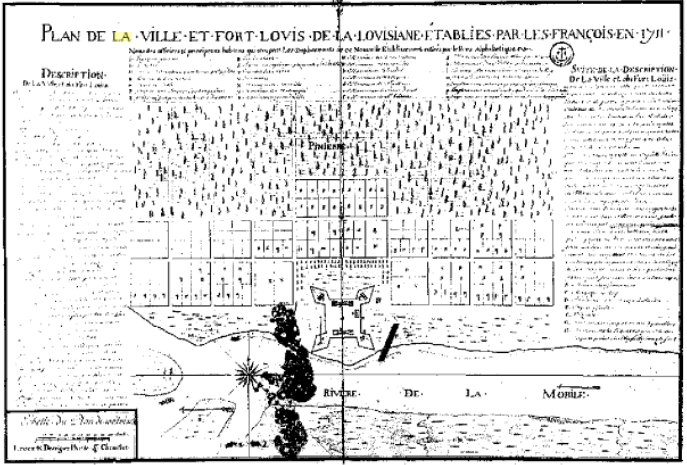 Plan du fort Louis de la Louisiane réalisé par Chevillot en 1711.